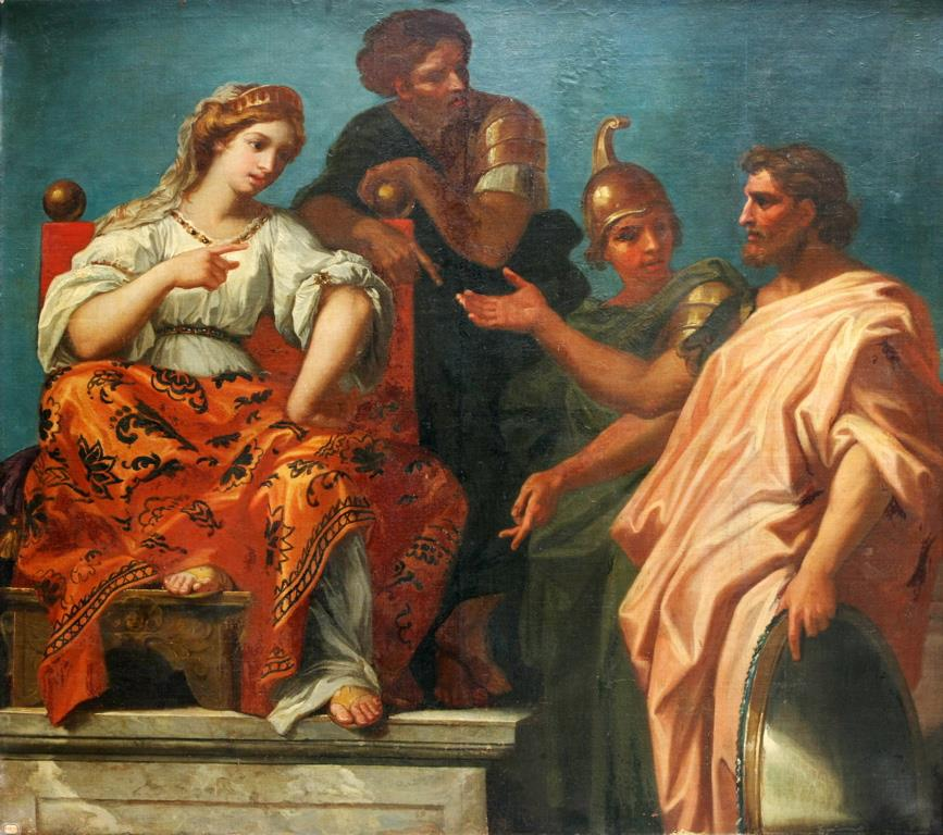 Reine donnant audience à un vieillard, par Nicolas Loir, dit "la reine de Saba", musée Rigaud, Perpignan.